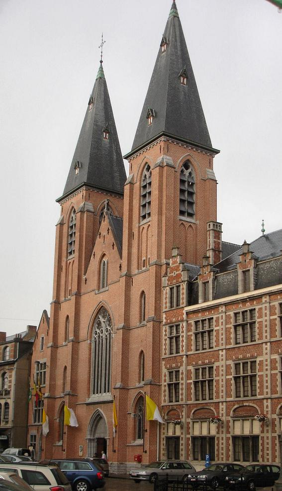 abdij en basiliek dendermonde